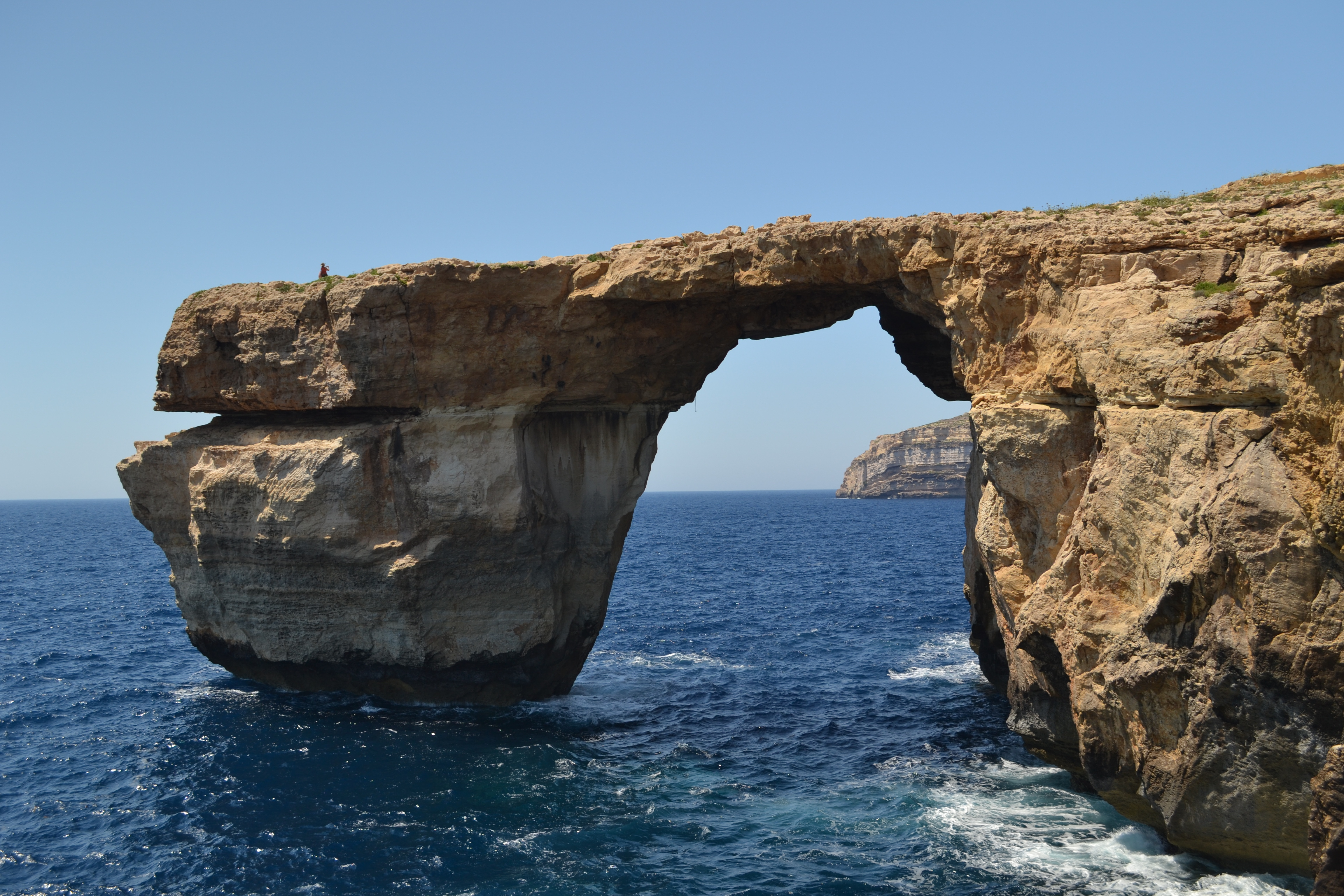 Мальта. Скала на западе острова Гоцо.